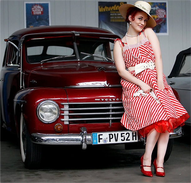 50er Jahre